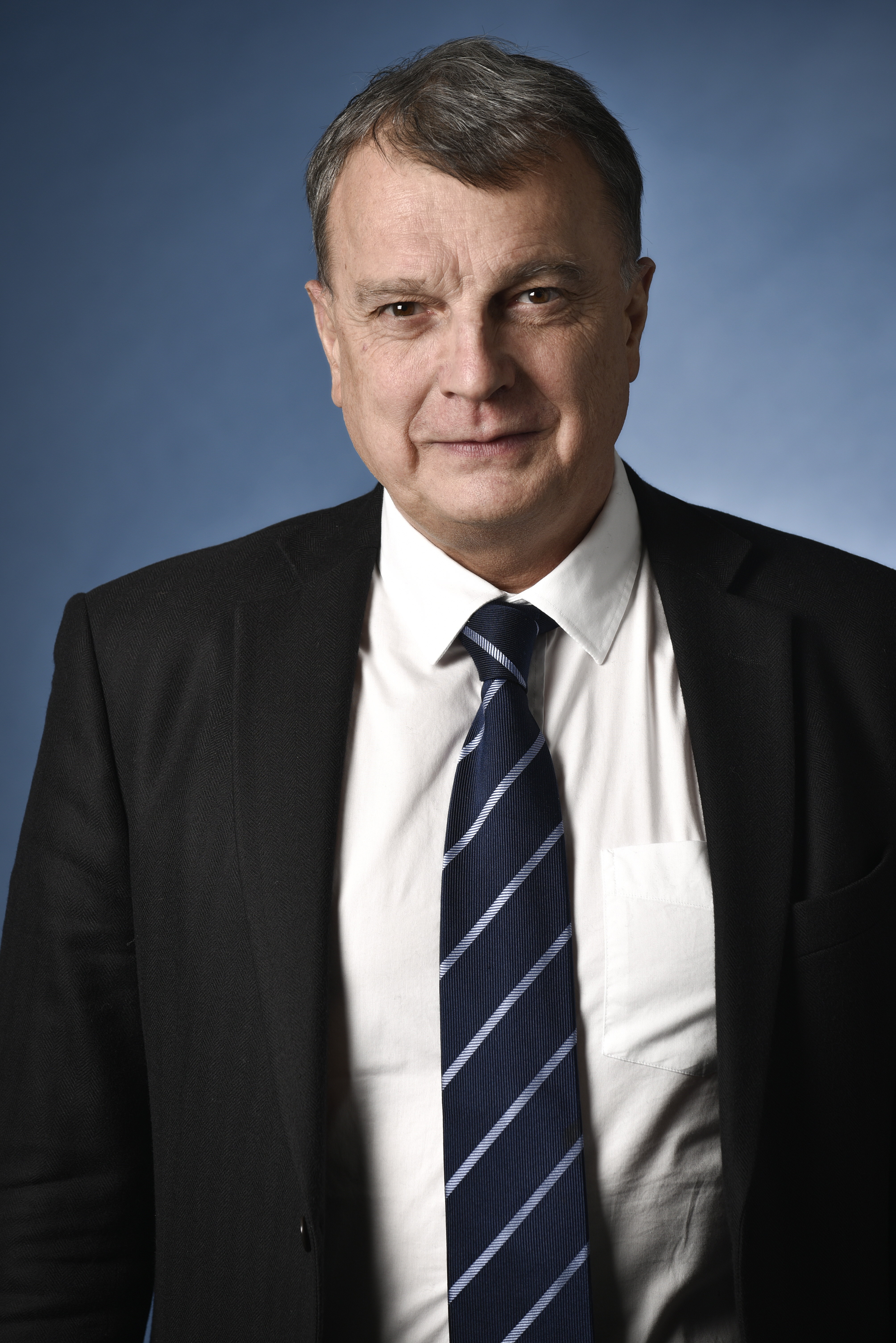 Christian Harbulot, Directeur de l'Ecole de Guerre Economique